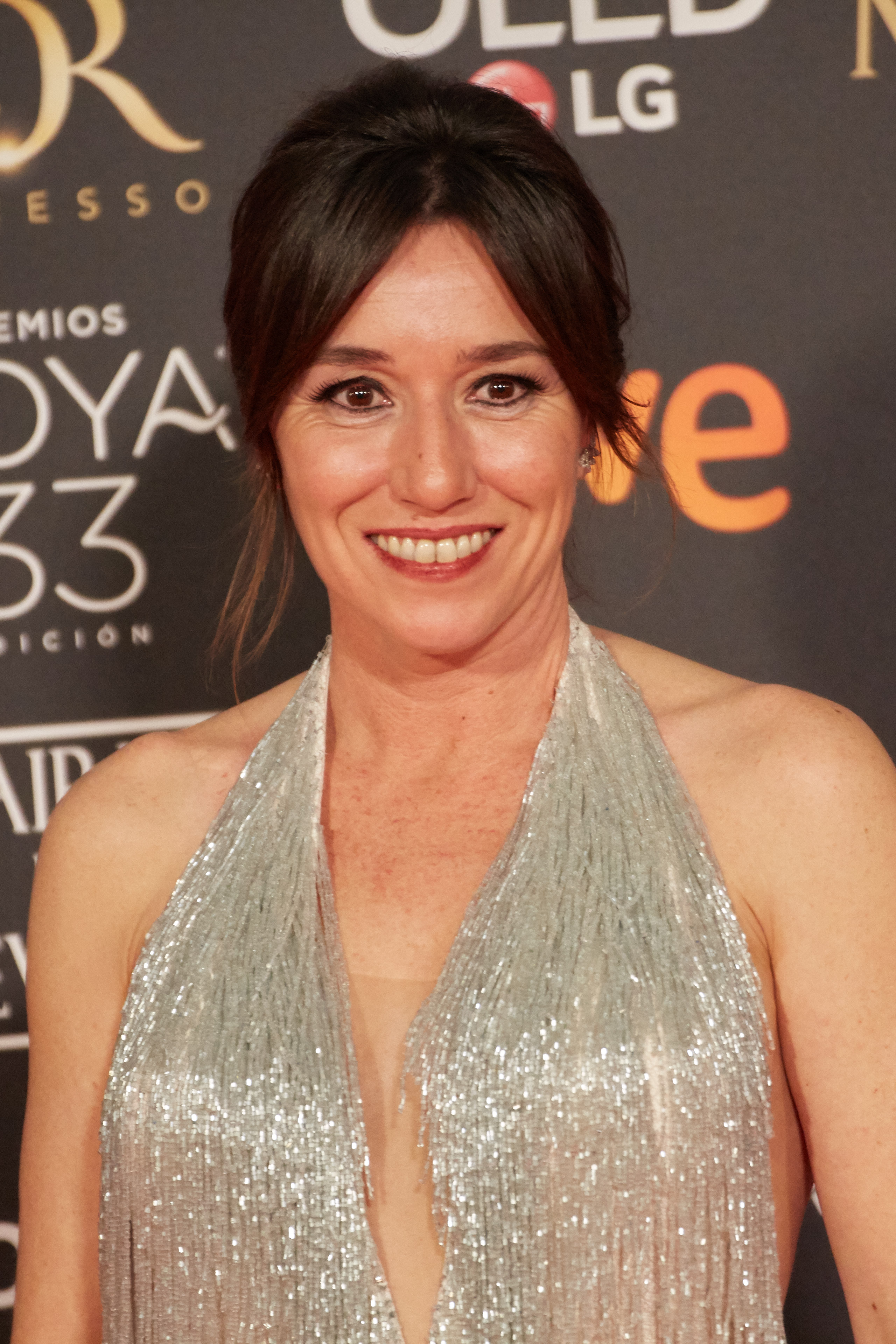 Lola Dueñas en la alfombra roja de los Premios Goya celebrados en Sevilla en Febrero 2019